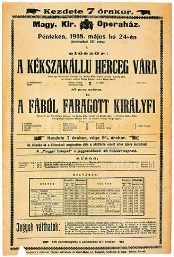 A kékszakállú herceg vára ősbemutatójának plakátja.